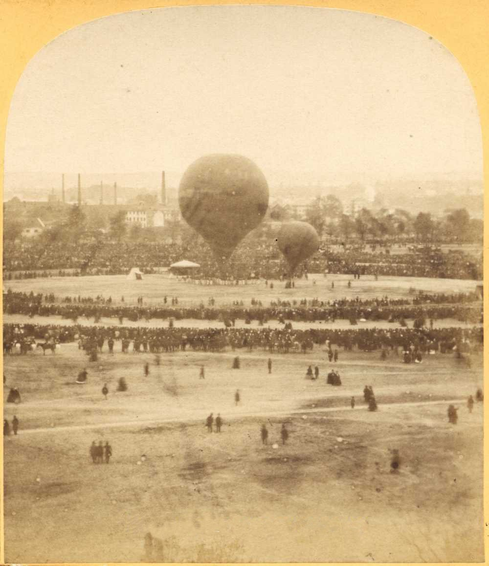 Paris,Champ de Mars. 18 Octobre 1863 à 5 heures du soir. Seconde ascension du ballon de Nadar : le Géant. A sa droite, le «grand ballon des fêtes ». Photographie stéréoscopique. Collection Francis Dupin.